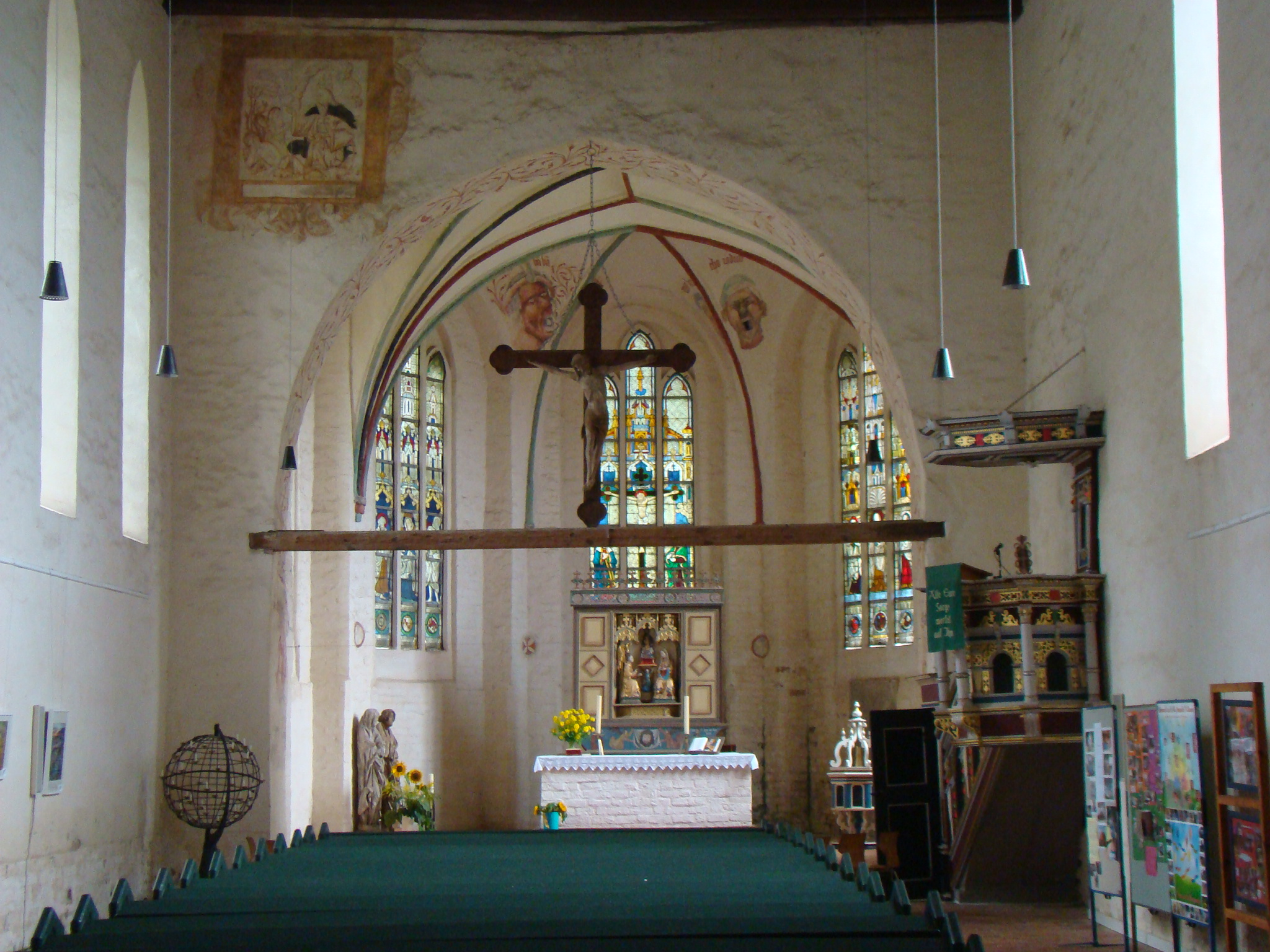 Klosterkirche Verchen. Foto: Peter Schmelzle 2011.